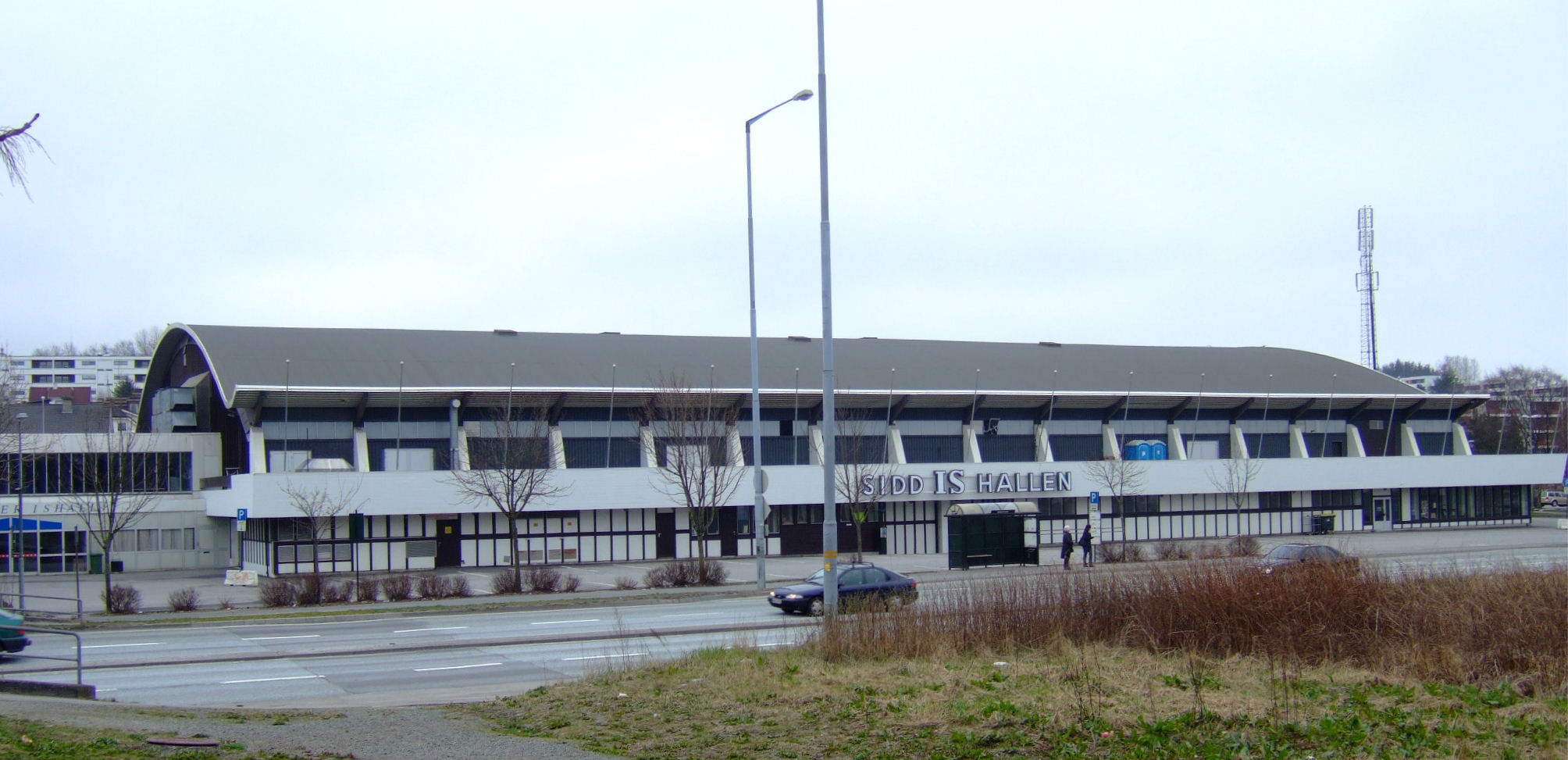 Siddishallen, Stavanger, Norway (Sportsarena)